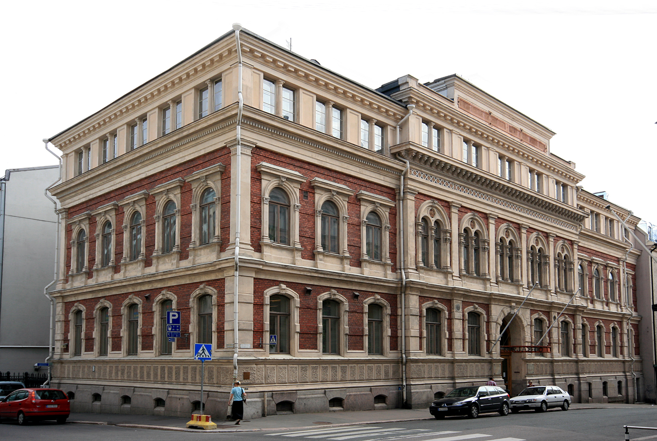 Rikhardinkadun kirjasto, Korkeavuorenkatu 43 / Rikhardinkatu 3, Helsinki. Arkkitehti: Theodor Höijer. Rakennusvuosi: 1881.